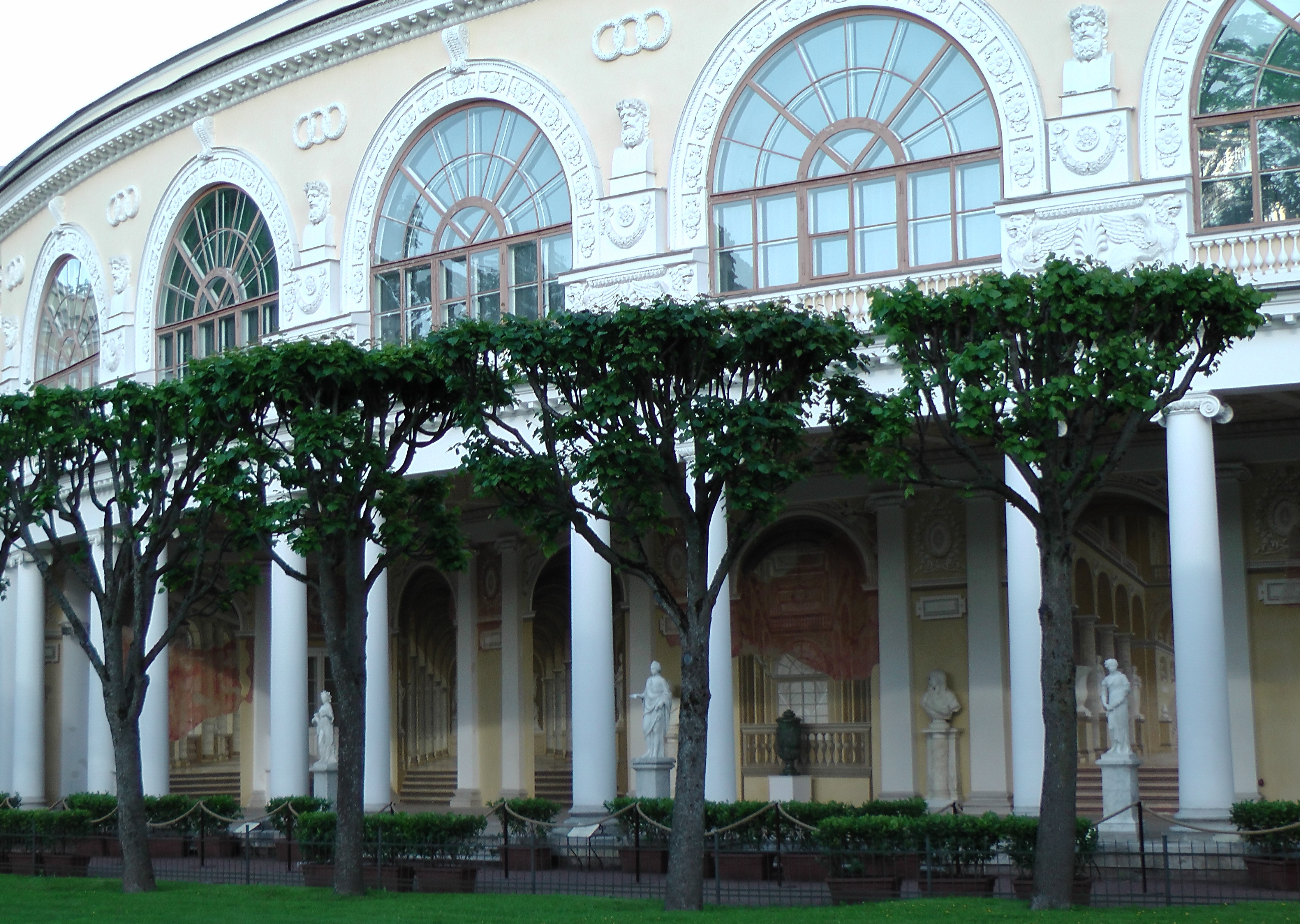 Галерея Гонзаго. Павловский дворец-музей.